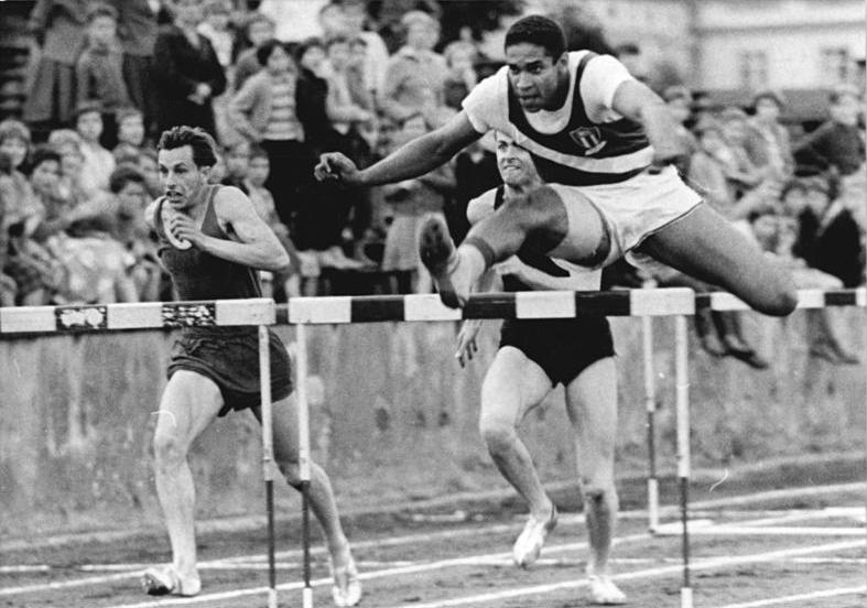 Betancourt Zentralbild Dörries 3641.A.-V. 20.7.1961 Freunde in der DDR Die prominentesten und erfolgreichsten Teilnehmer an einem Abendsportfest am 19.7.1961 im Potsdamer Ernst-Thälmann-Stadion waren die von 2500 Zuschauern herzlich gefeierten Leichtathleten der gegenwärtig in der DDR weilenden Sportdelegation aus Kuba. UBz: Der kubanische Hürdenläufer Betancourt (rechts) legte die 110-m-Distanz in 14,8 Sek. als klarer Sieger vor dem Berliner Mertens (16,4 Sek.) zurück.